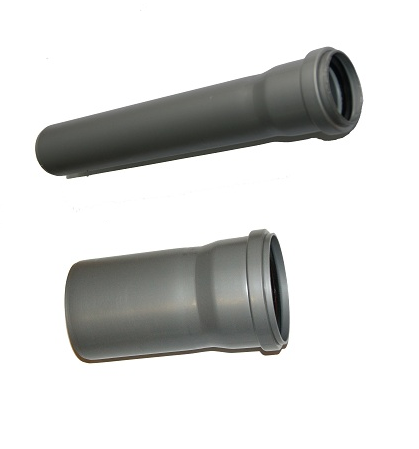 Кусок короткой трубы